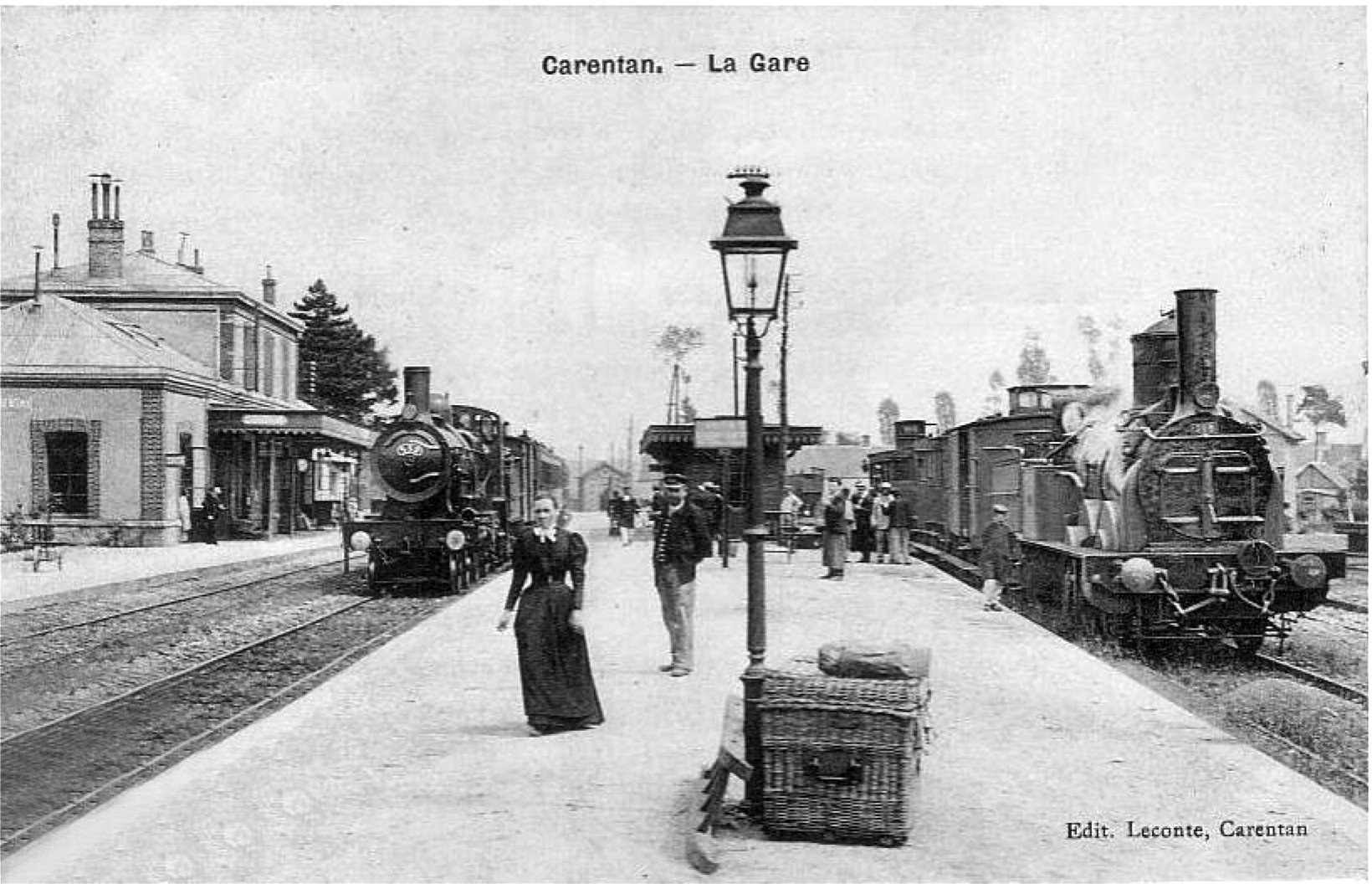 La gare de Carentan au début des années 1900. Elle dispose alors d'un quai central avec à l'extérieur la ligne pour Carteret.